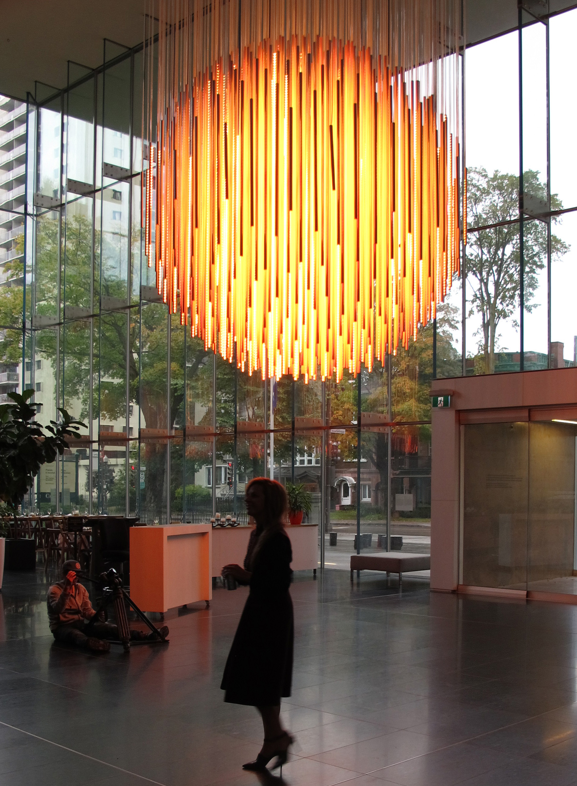 Solar Equation. Installation de Rafael Lozano-Hemmer au Musée national des beaux-arts du Québec, Québec, Canada